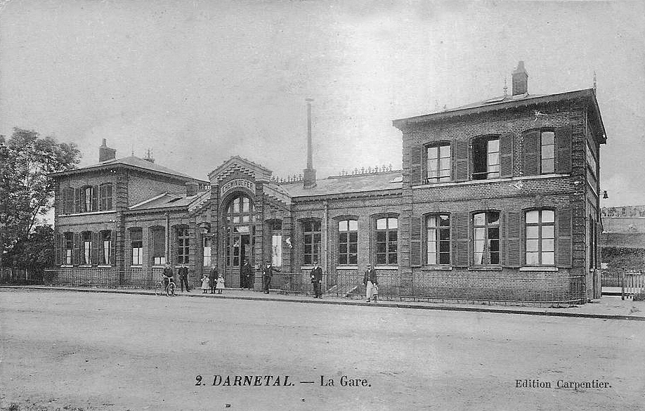 Le bâtiment voyageurs de la gare vu depuis la place vers 1900.